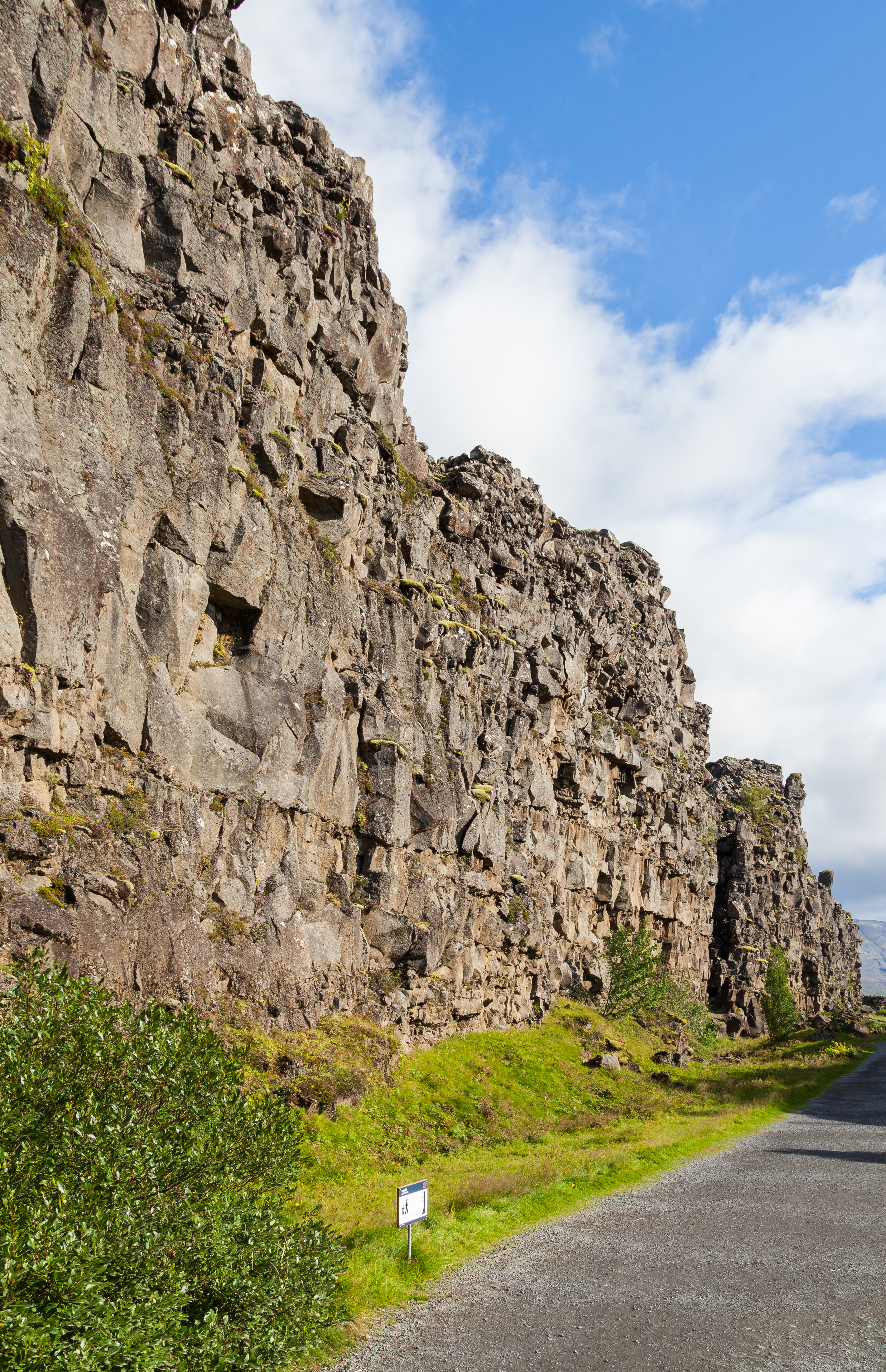 Roca de la Ley, Parque Nacional de Þingvellir